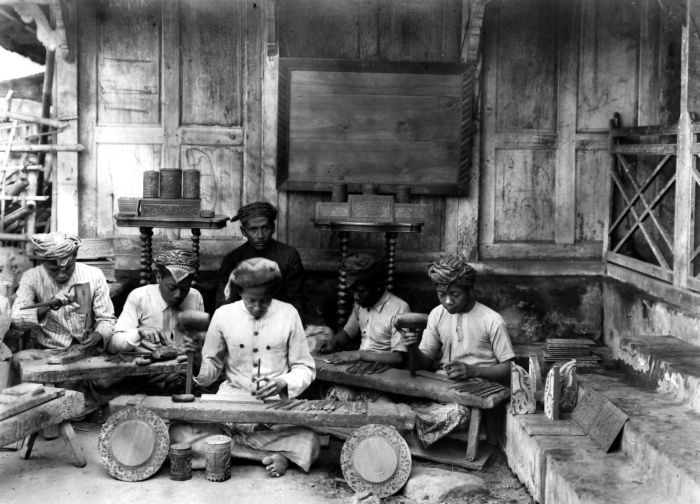 Negatief. In de woningen van de meer gegoede Javanen was fraai houtsnijwerk een typische karaktertrek. Hiervoor werd bij voorkeur teak (jati) gebruikt. Het ging hier om stijlen en deuren, maar ook om linnenkasten en meubels. Dit alles werd vervaardigd door Javaanse ambachtslieden, zij het dat rond 1900 veel meubelmakers Chinezen waren. Het maken van houten wagens was echter weer helemaal in Javaanse handen. Rond 1875 stond de stad Japara bekend om zijn schrijnwerkers en was veel van hun werk te zien in de welvarende nabijgelegen stad Koedoes waar veel rijke Javaanse kooplieden woonden. Rond 1900 wordt Solo genoemd als centrum met het beste houtsnijwerk. (P. Boomgaard, 2001). Een groep houtsnijders uit Japara aan het werk